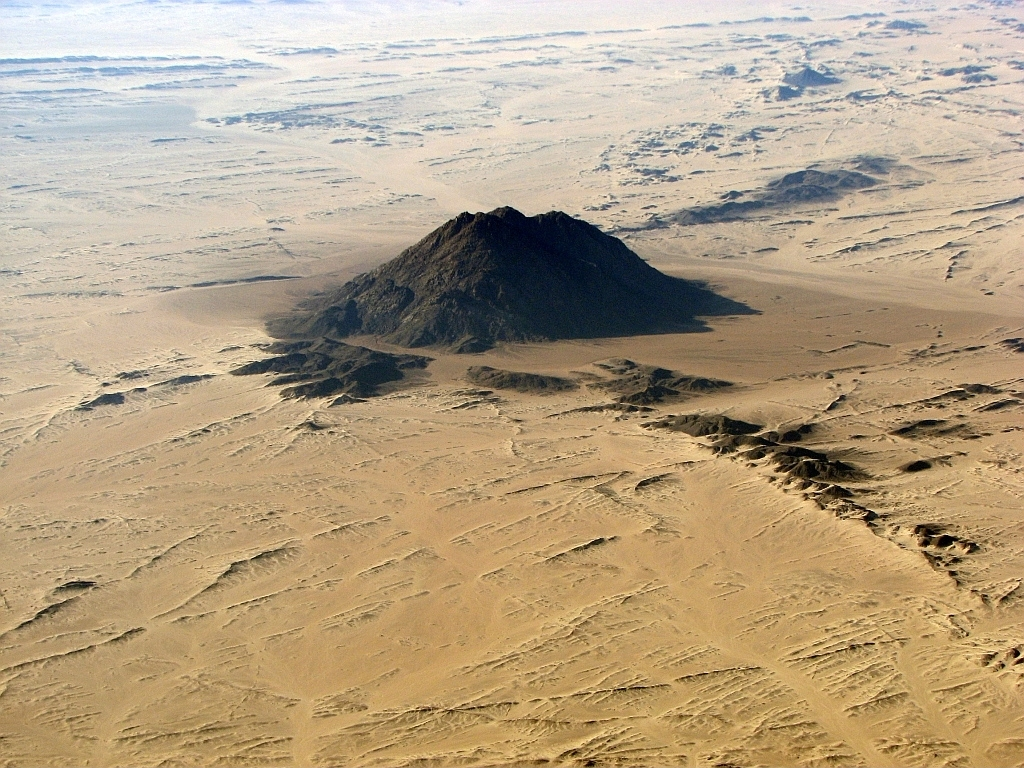 Bayuda